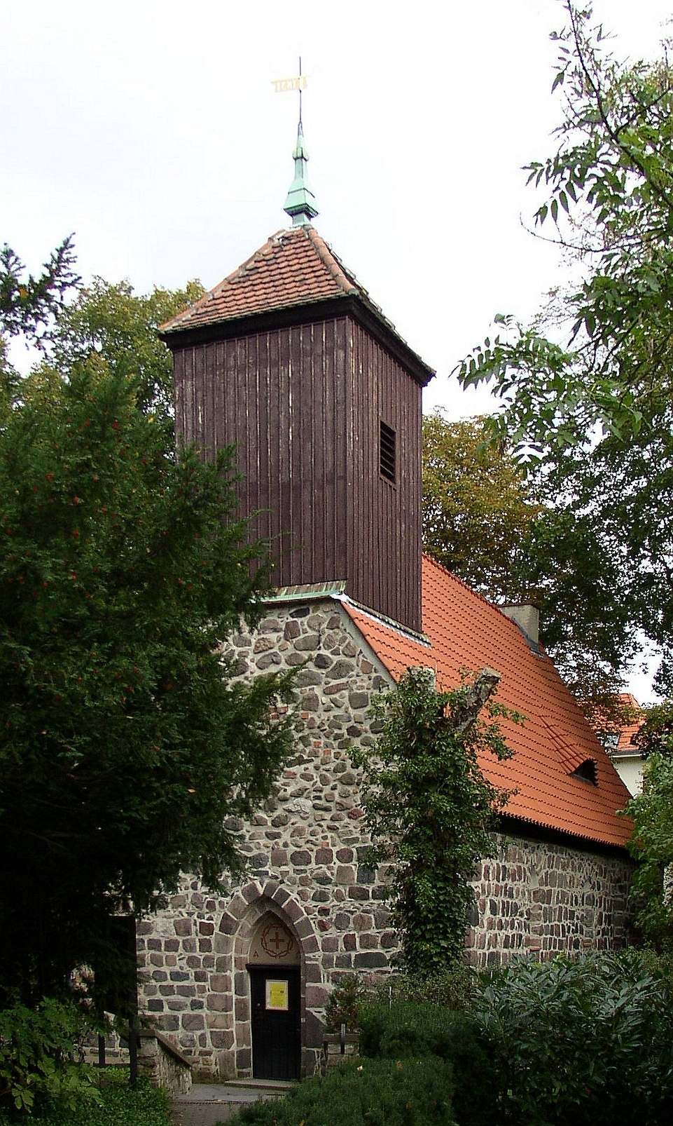 Church of Berlin-Schmargendorf